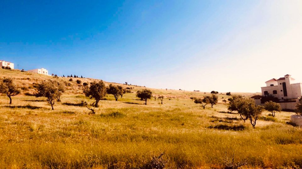 صورة لأحد المناطق الطبيعية في شفا بدران في العاصمة عمان